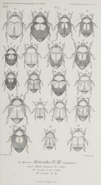 Une des planches de dessins au trait réalisée par S.A. de Marseul